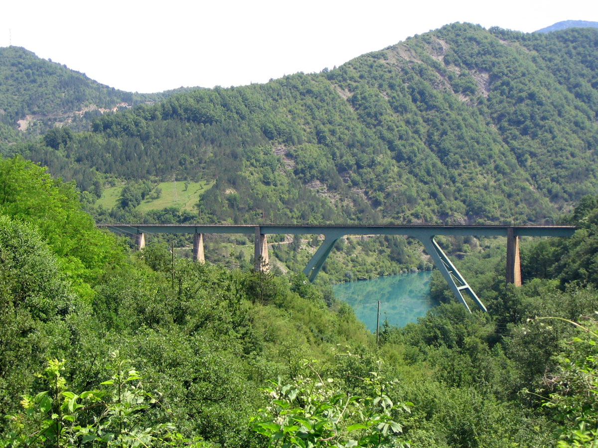 Željeznički most preko Neretve, južno od Jablanice